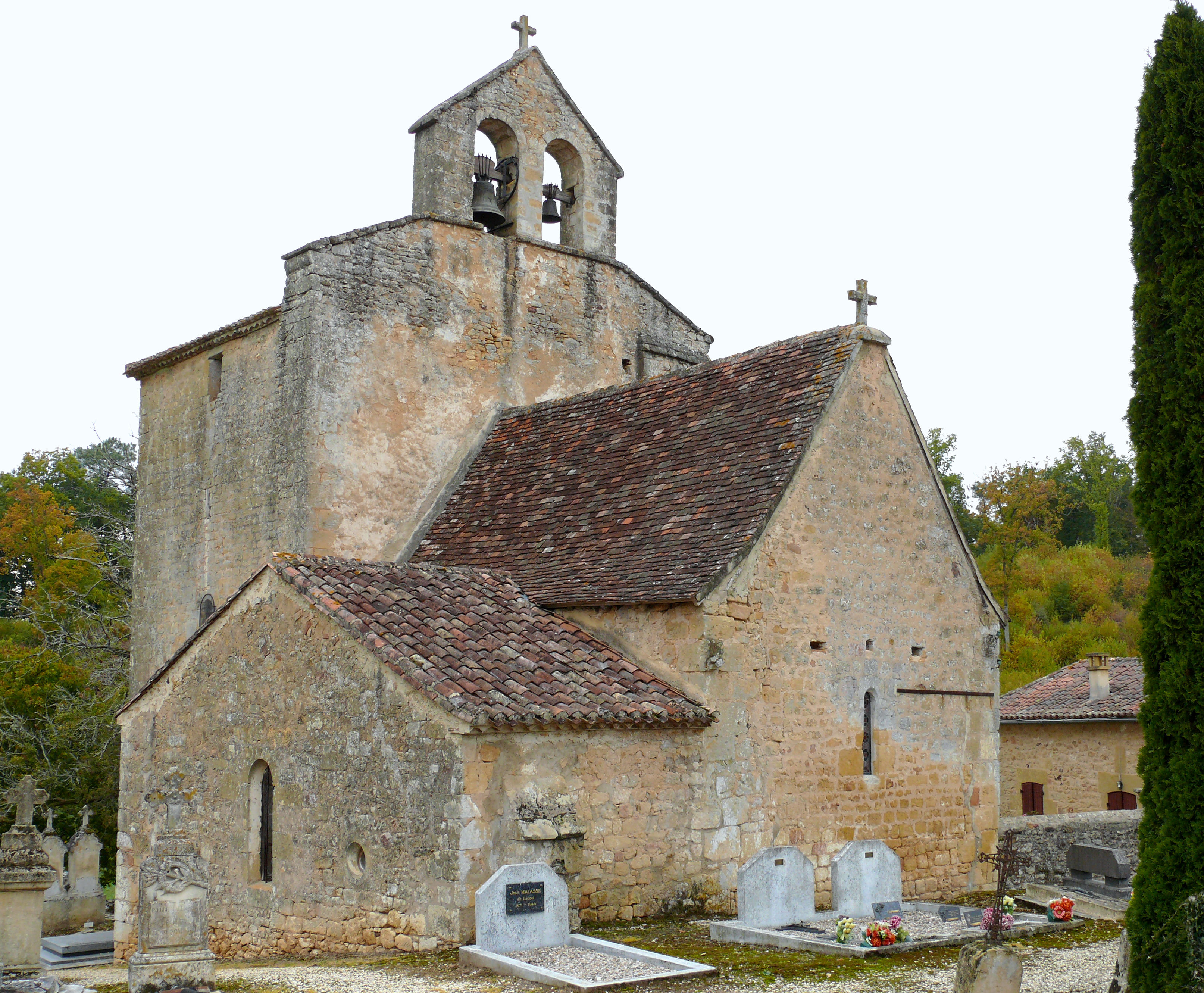 Saint-Romain-de-Monpazier - Eglise Saint-Romain